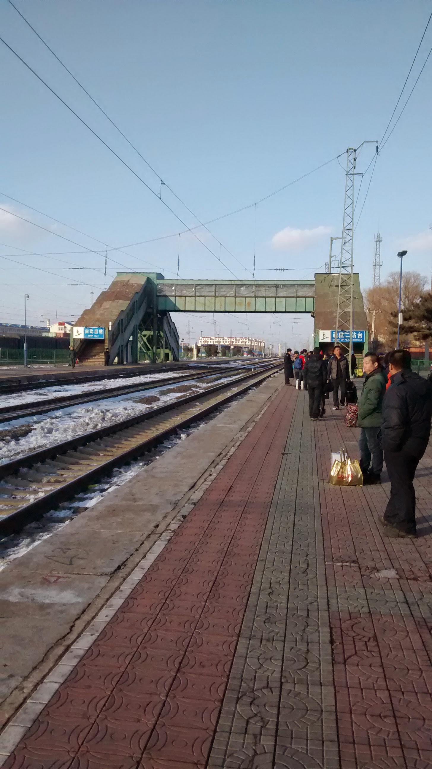 Dehui, Changchun, Jilin, China